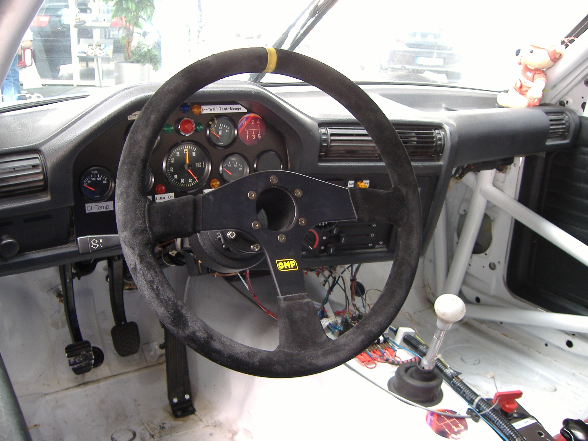 BMW E30 Renncockpit